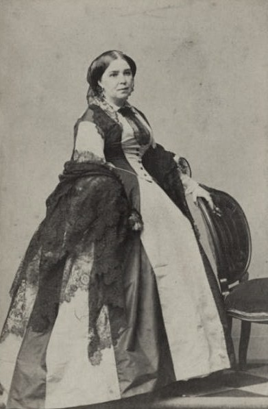 Софья Александровня Устинова, ур. Полянская (02.01.1808—1866).